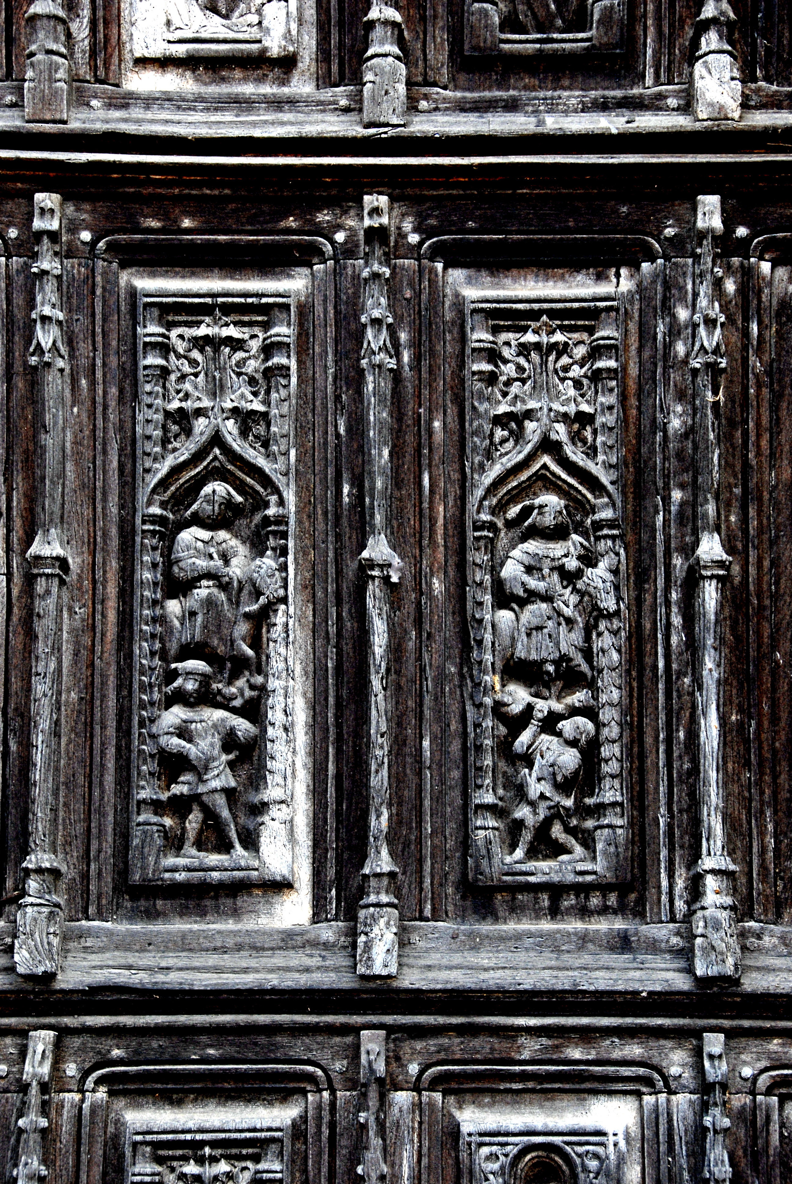 St-Thibault de Saint-Thibault, Nordportal, Detail Türblatt